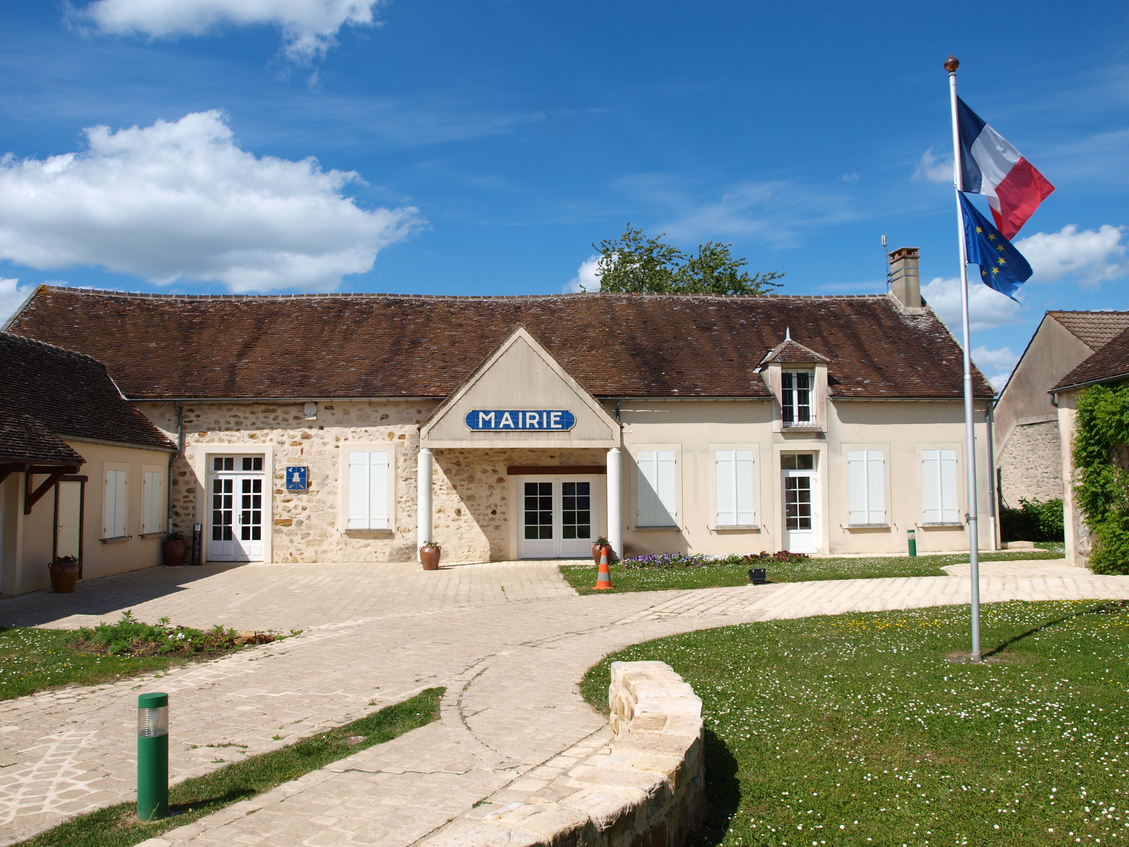 La Brosse-Montceaux (Seine-et-Marne, France)